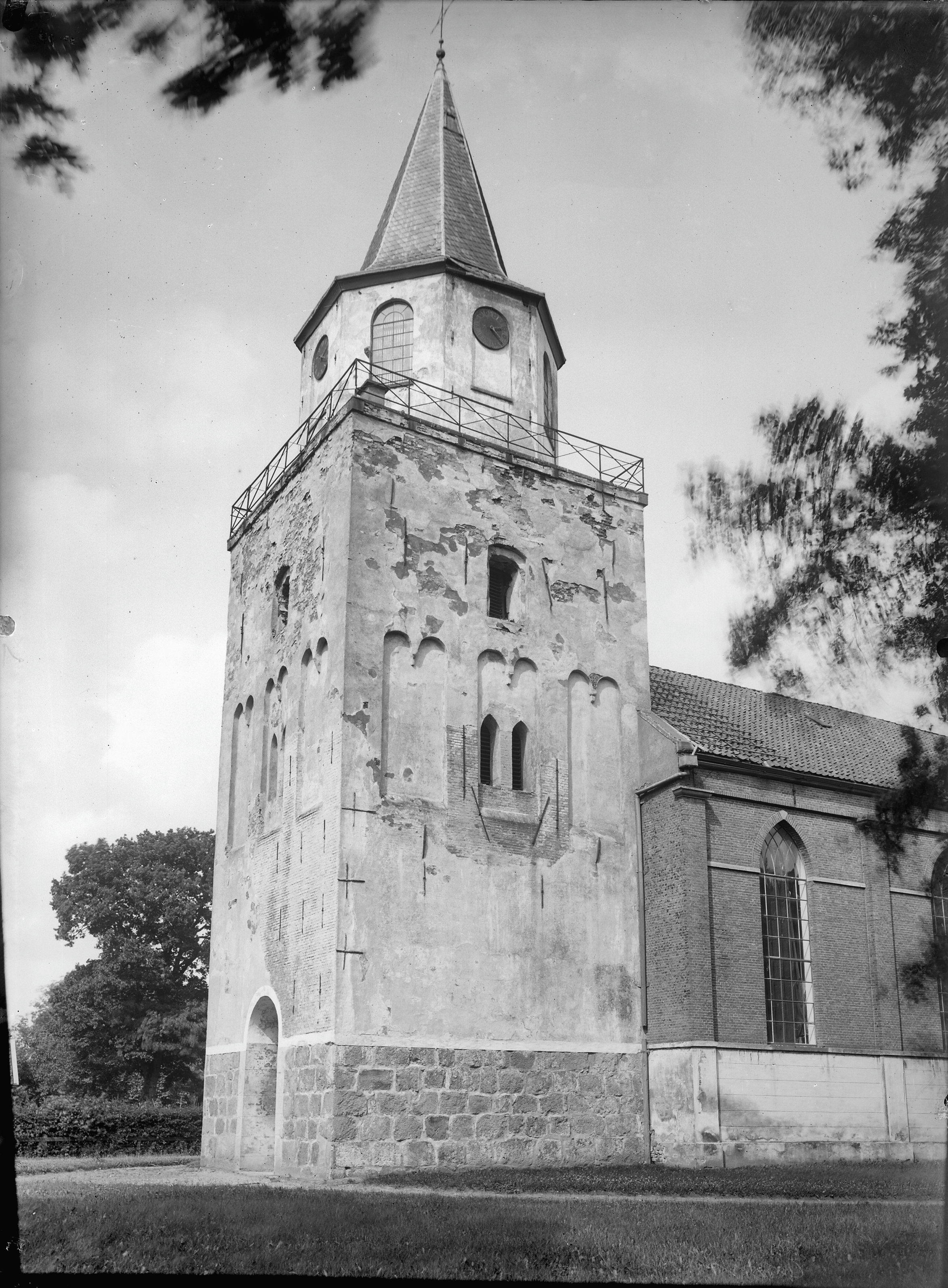 N.H.Kerk en Toren: Toren